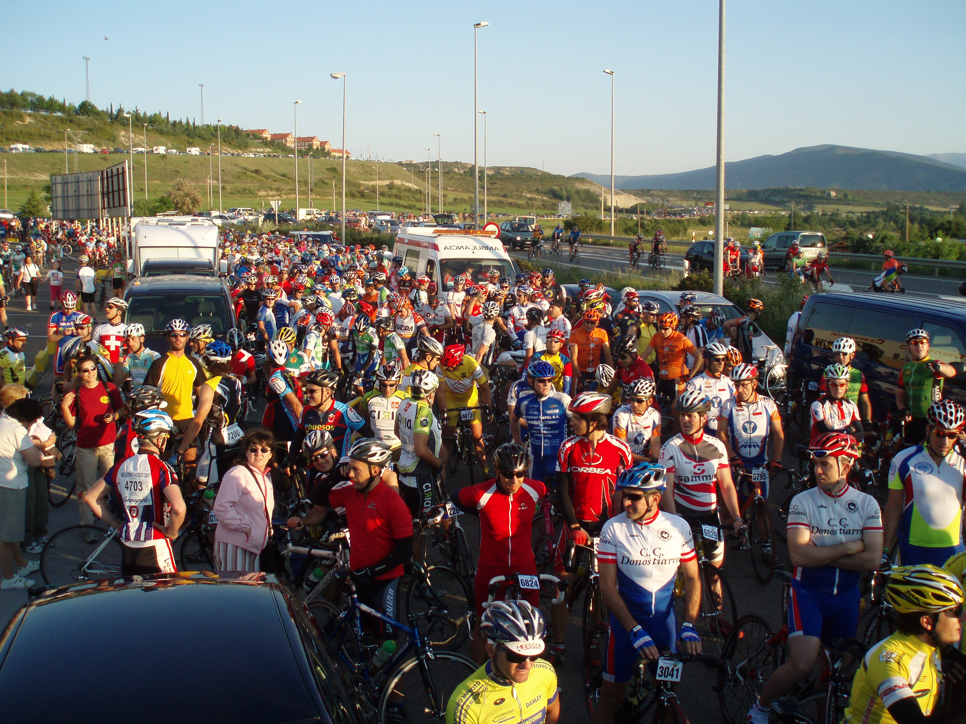 Los ciclistas esperan la salida a la Marcha Cicloturista Quebrantahuesos en su edición de 2010.